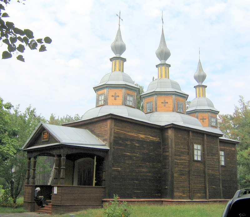 ドニプロ・ウクライナ伝統的文化博物館.